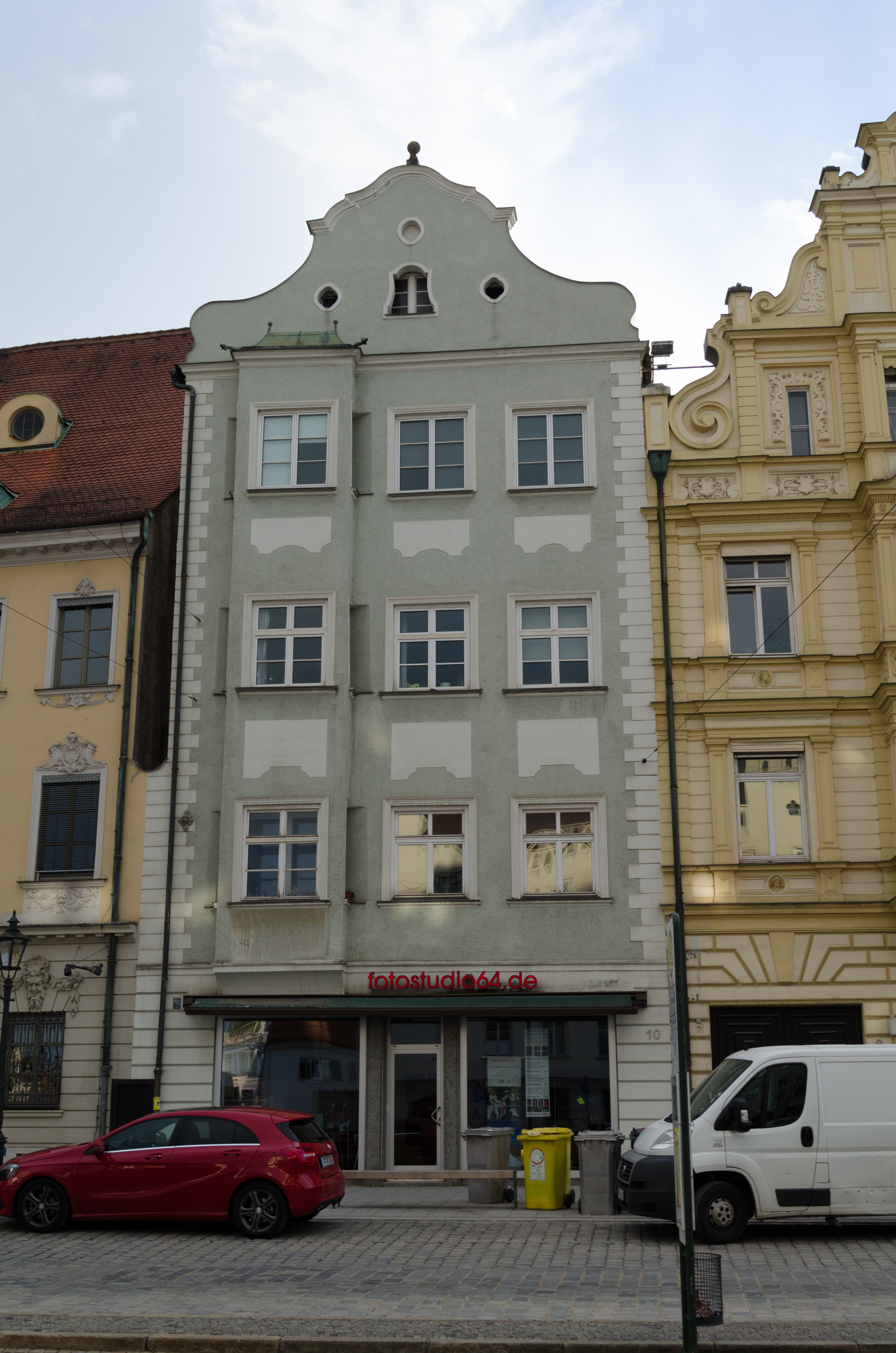 Augsburg, Ulrichsplatz 10